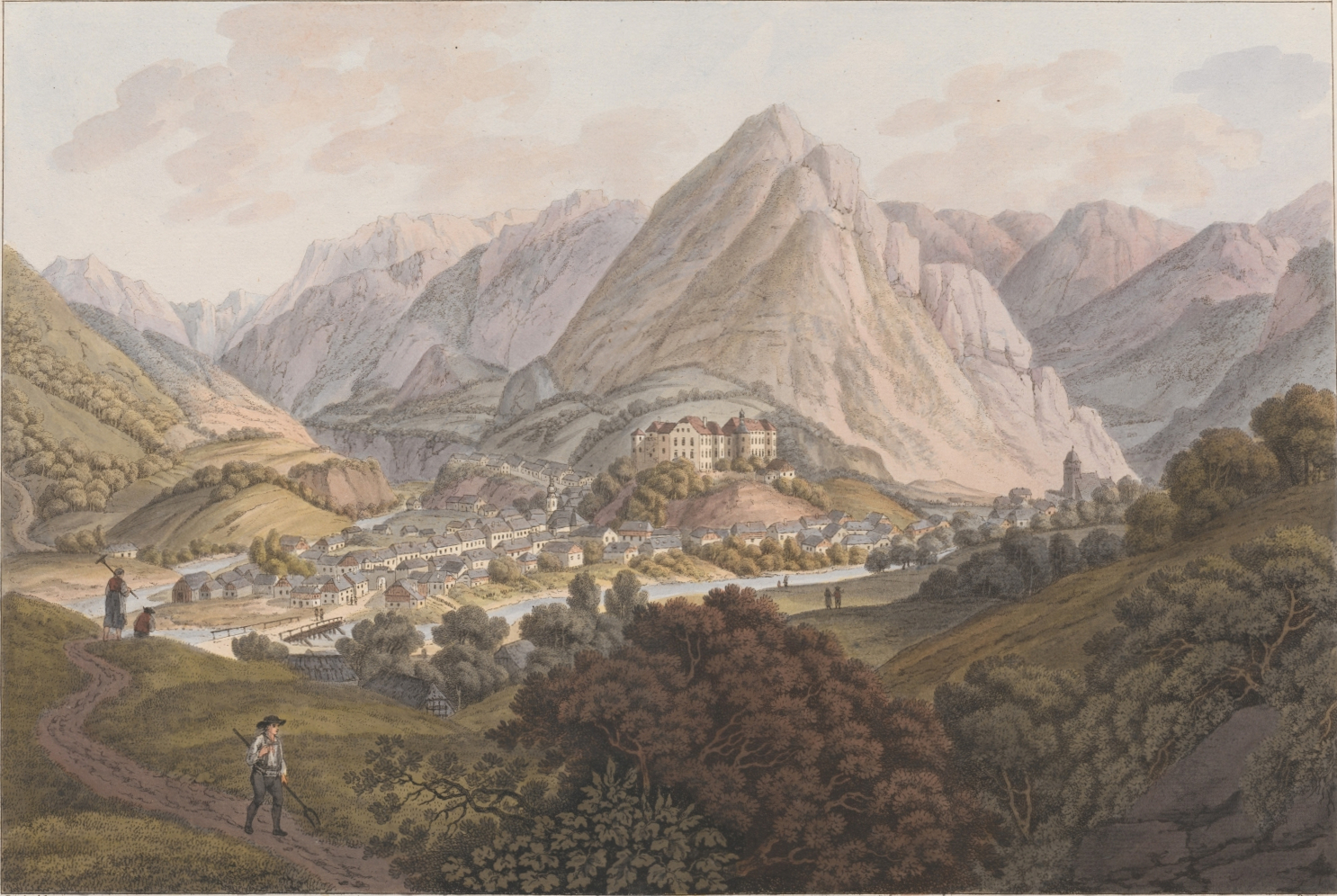 Slovenian: Tržičtitle QS:P1476,sl:"Tržič" label QS:Lsl,"Tržič"